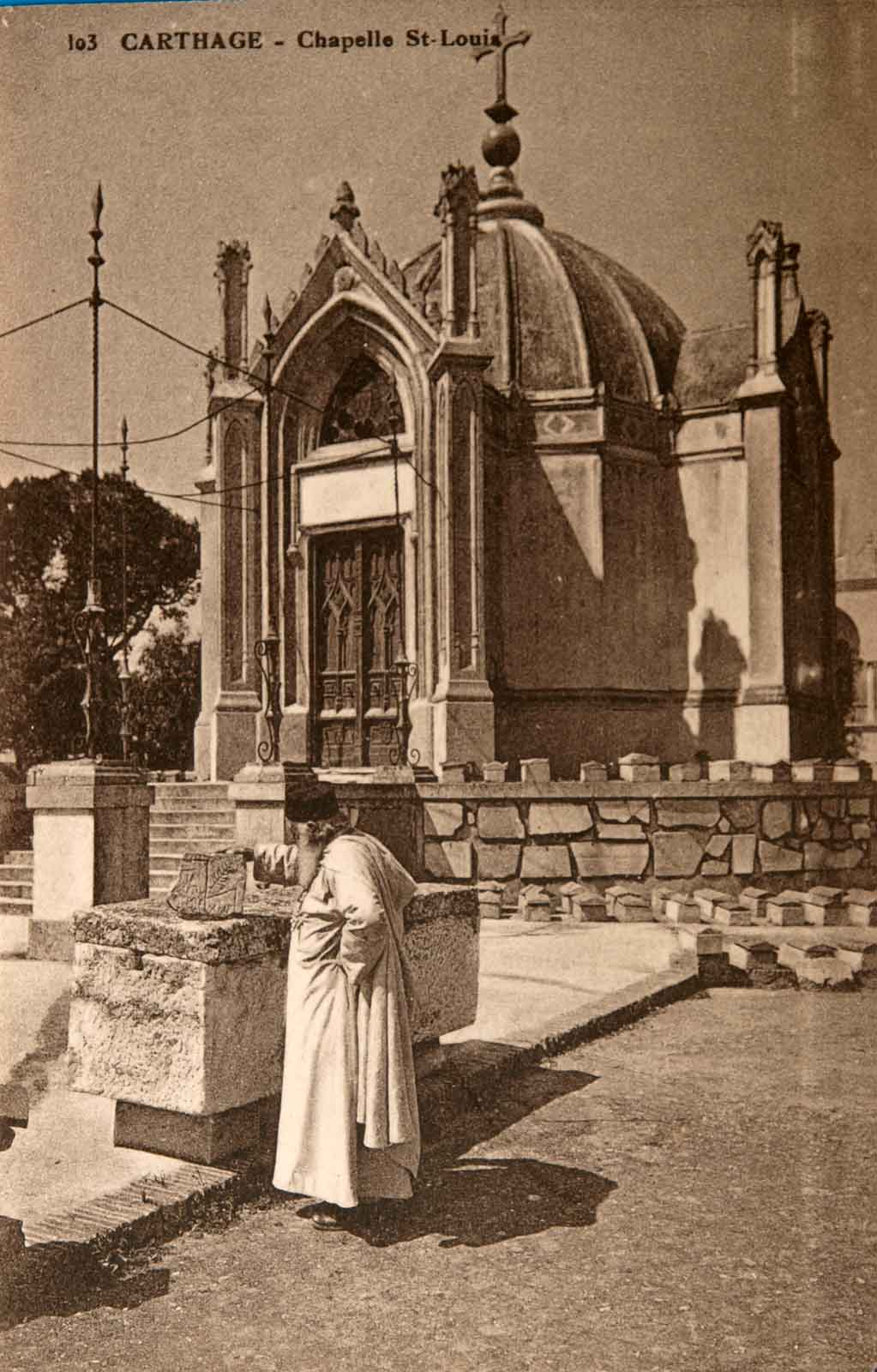 Chapelle Saint Louis de Carthage. L'homme vu de dos est le Père Alfred Louis Delattre.